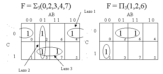 Ejemplo de simplificación por Karnaugh